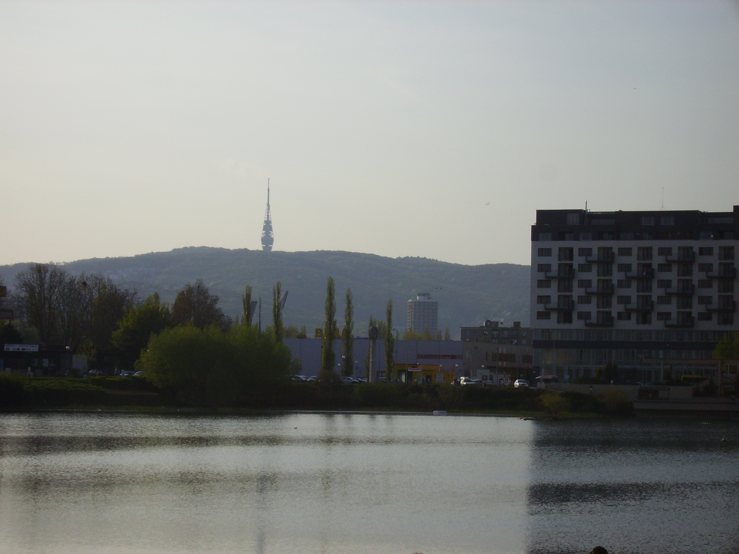 Description: Štrkovecké jazero v Bratislave (Štrkovec lake in Bratislava, Slovakia) Author: Radovan Bahna, April 2006